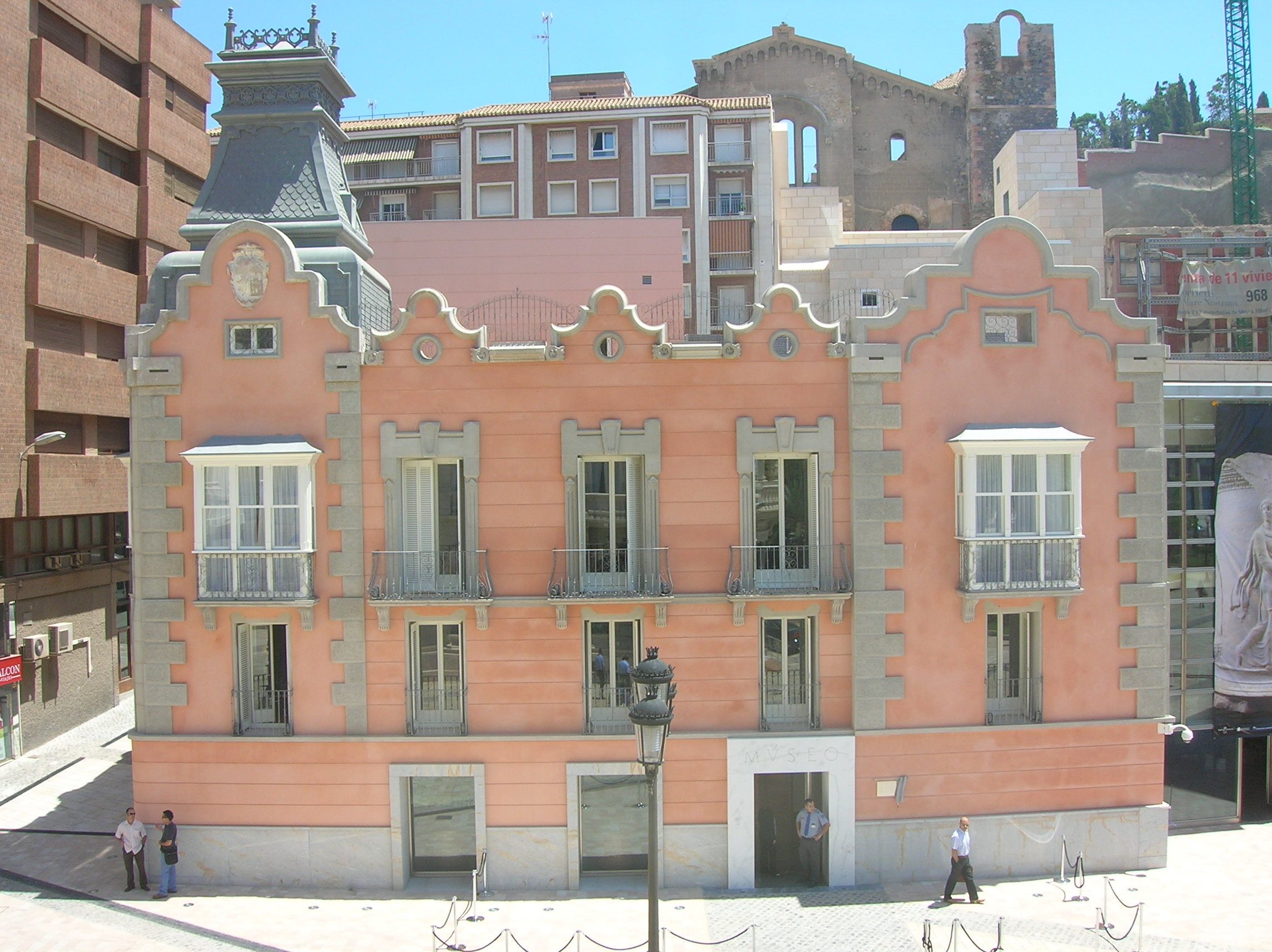 Vista del Palacio Pascual de Riquelme, desde el Ayuntamiento de la ciudad de Cartagena España, entrada al conjunto del Museo y Teatro Romano de Cartagena